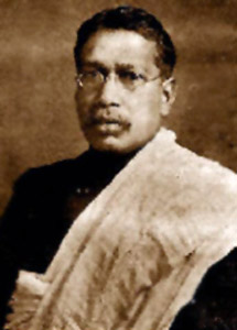 ಕನ್ನಡ: no original description